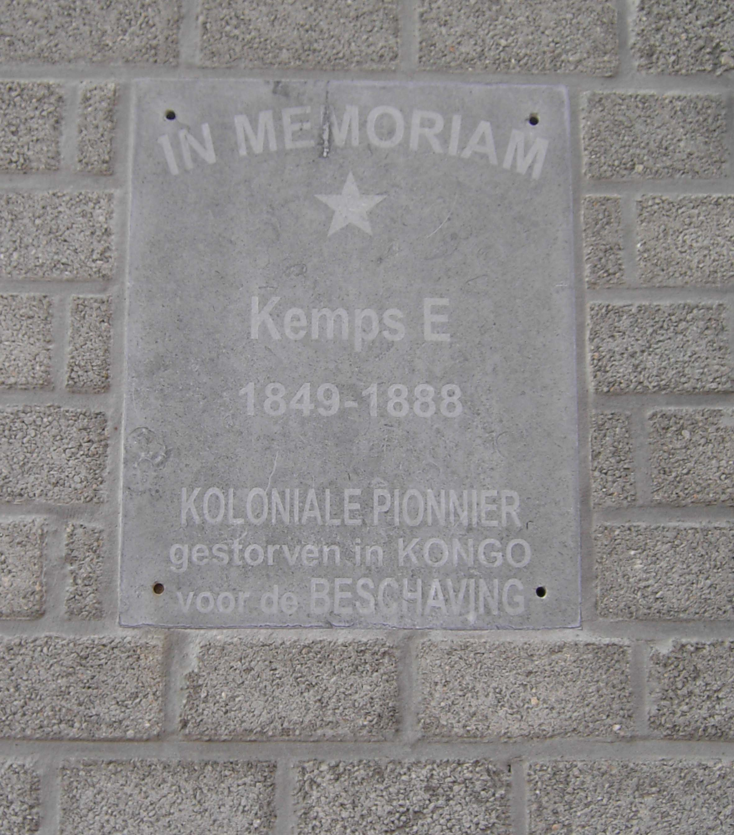 Holsbeek - gedenksteen van een oud-inwoner